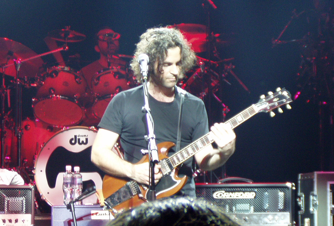 Dweezil Zappa a ZPZ csapattal (Budapest, Petőfi Csarnok)